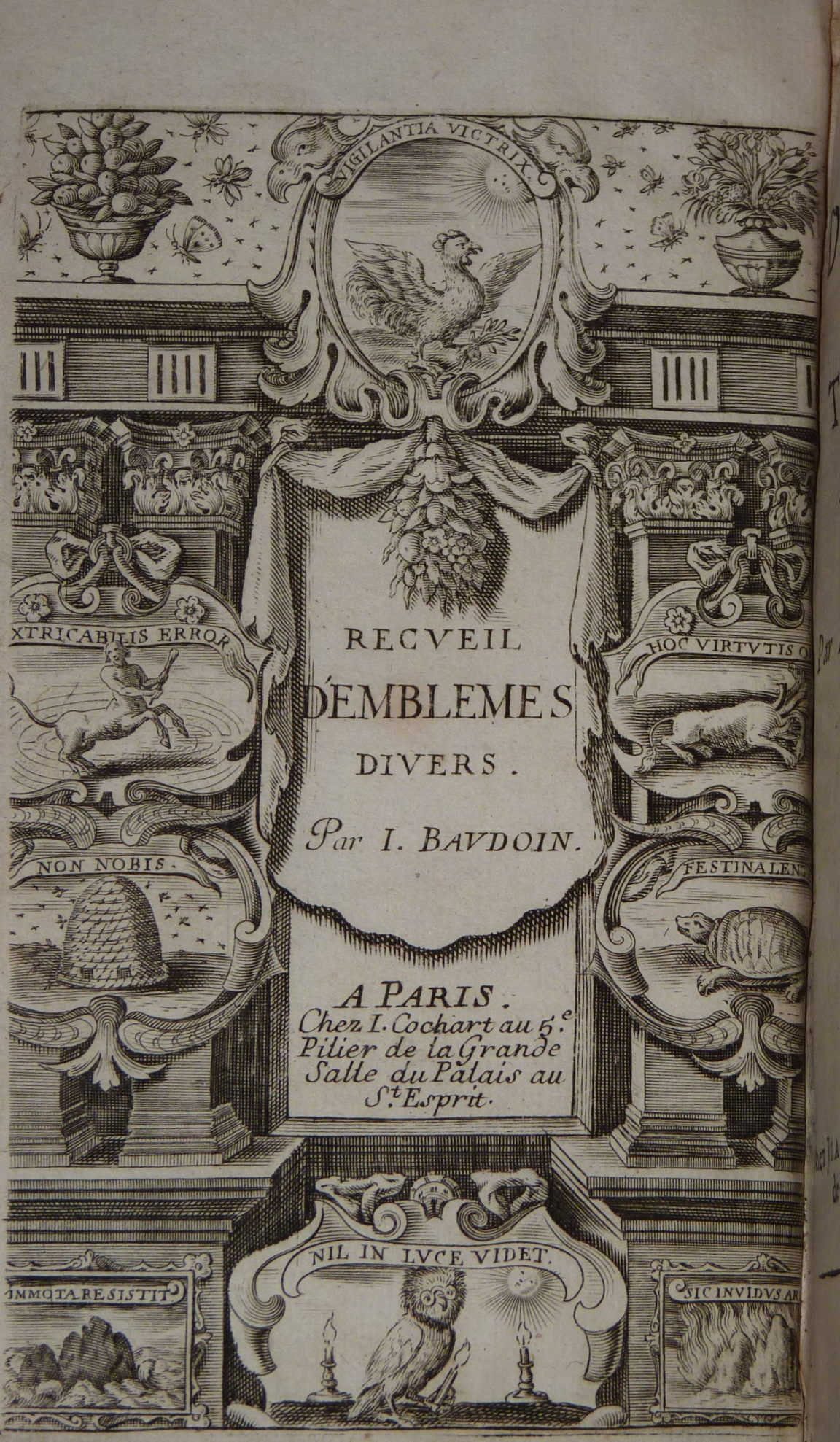 Frontispice du Livre Recueil d'Emblêmes ou tableau des sciences et des vertus morales par I. Baudoin, de l'académie françoise Tome I A Paris chez Jean Cochart, au cinquième pillier de la grande salle du Palais au S. Esprit. M. DC. LXXXV. Avec Privilege du Roy